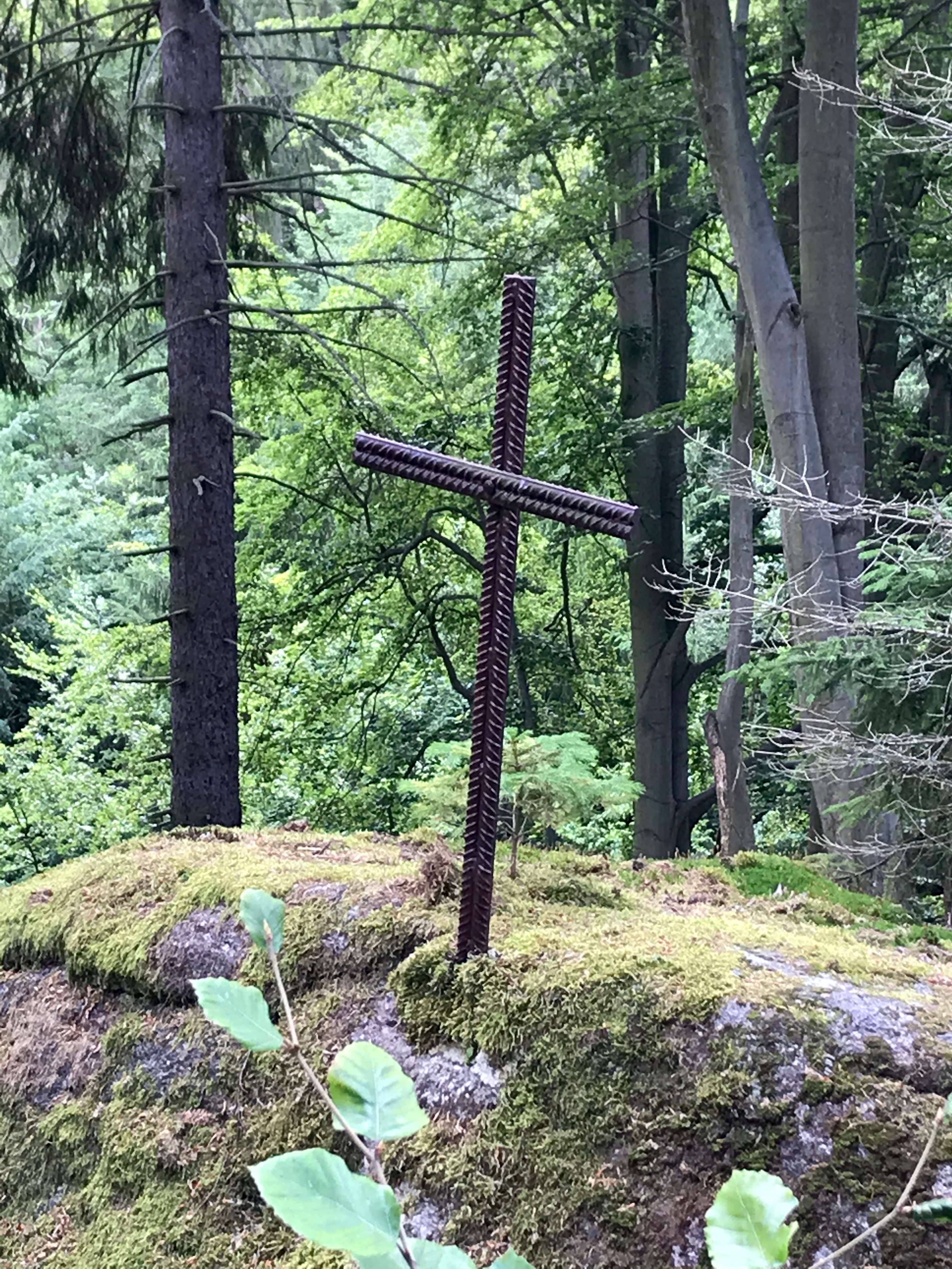 Kříž na Russelově vyhlídce nad Lesní pobožností v karlovarských lázeňských lesích